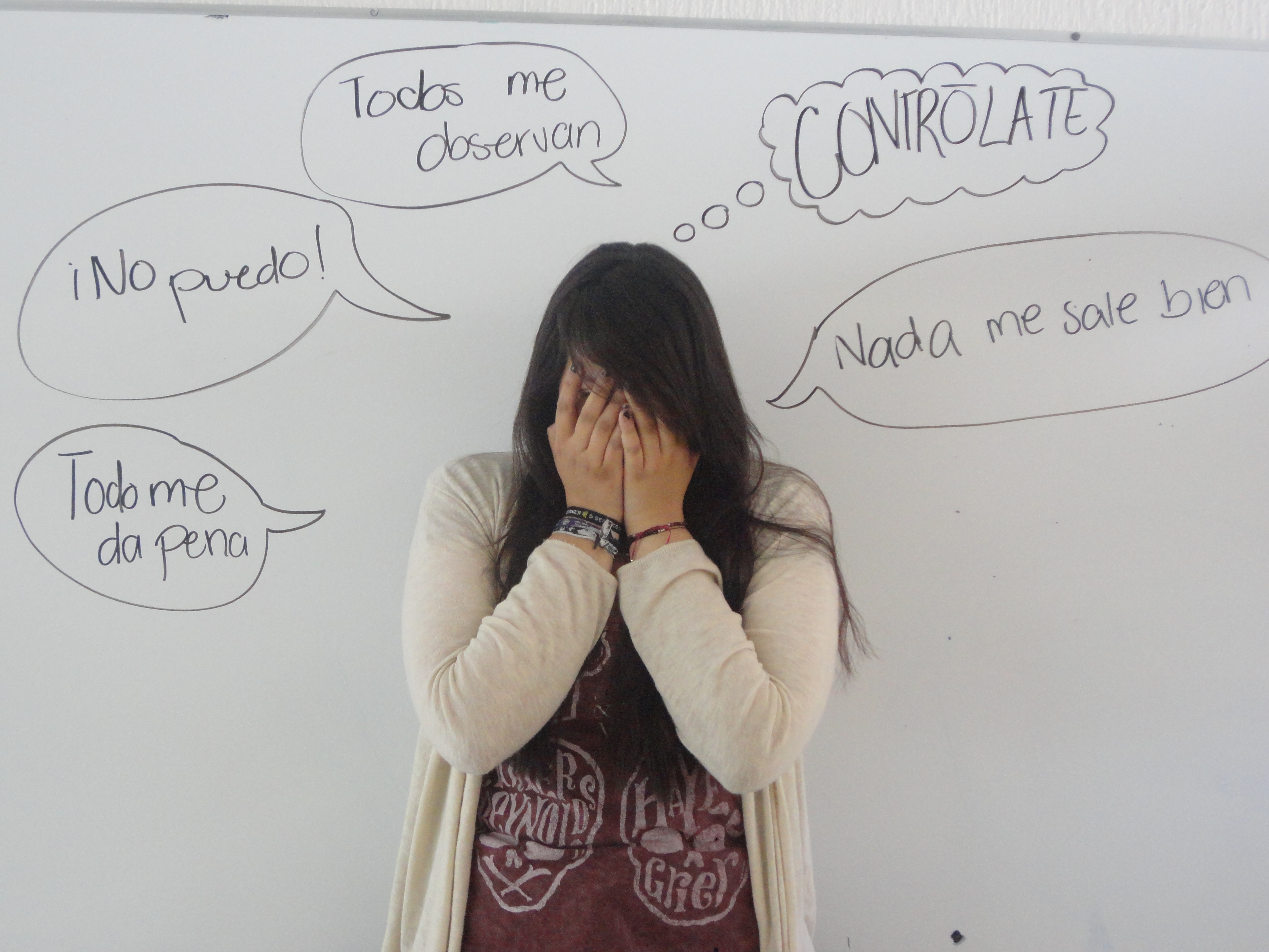 Esta imagen presenta los pensamientos más característicos de una persona que sufre fobia social. Junto con ello, la postura de la joven expresa una frustración que es resultado de la ansiedad que fue provocada por los mismos.